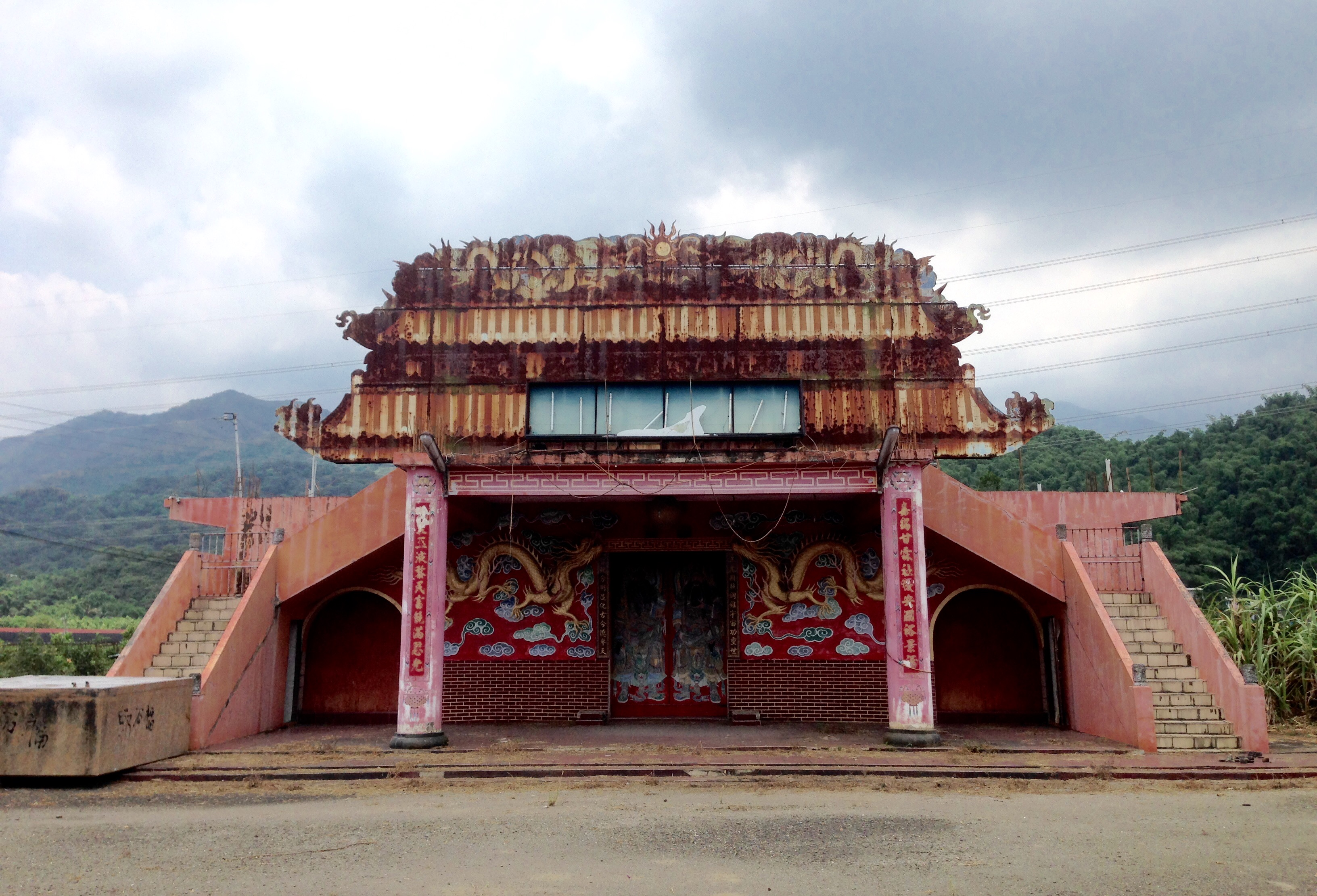 中文（台灣）: 祭拜嘉慶帝的嘉龍宮。